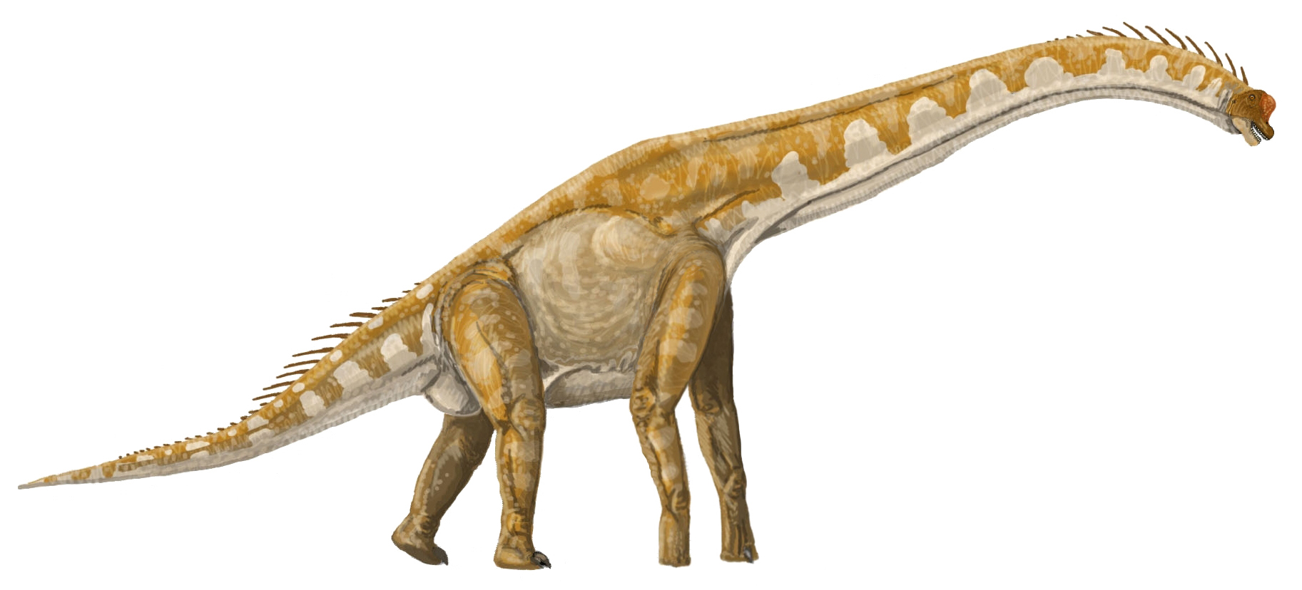 Giraffatitan, Digital